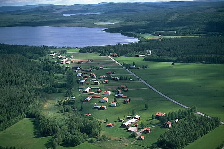 Motiv: Edens by Nyckelord: Flygbilder, Riksintressen Kategori: JordbruksbyEdens by